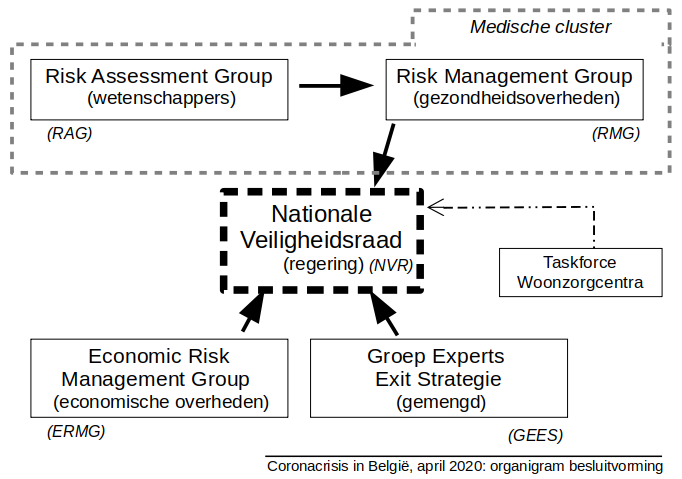 Coronacrisis in België (april 2020): organigram van de federale besluitvorming